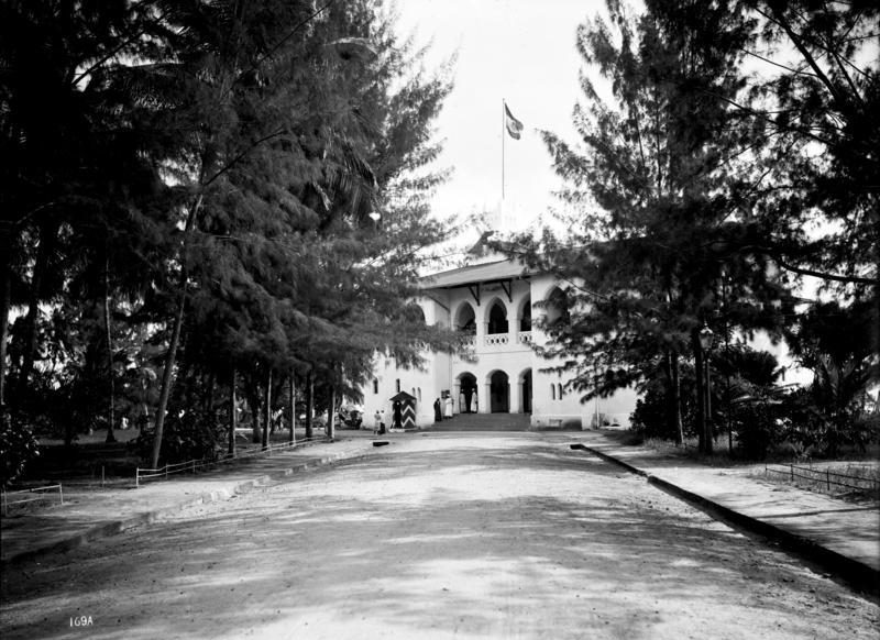 Bezirksamt in Tanga